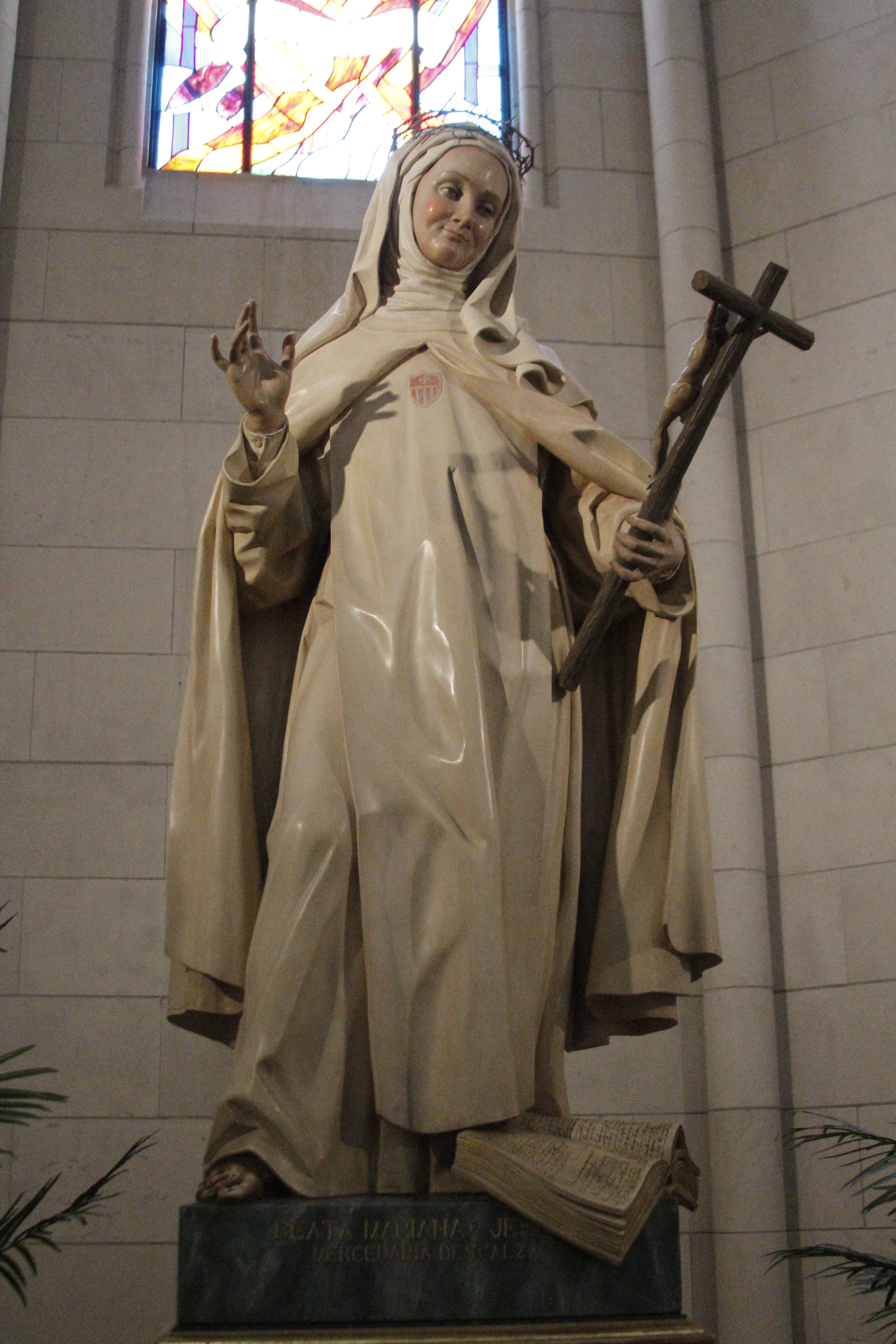 Interior da Catedral